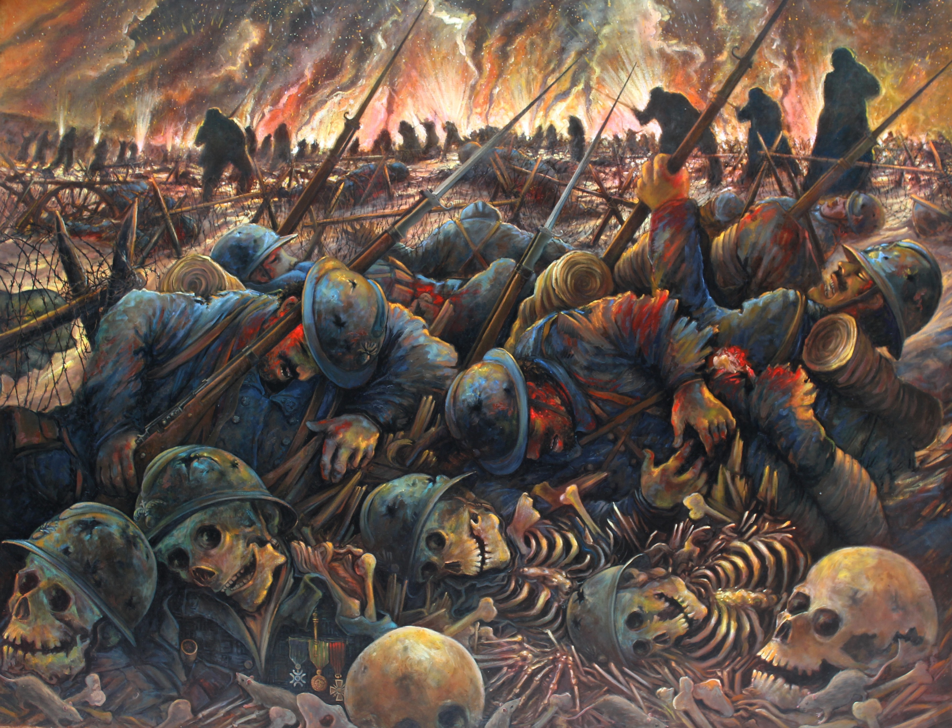 Année 2014 Triptyque / huile sur toile tableau gauche Hauteur : 1, 85 mètre Largeur : 2, 40 mètres